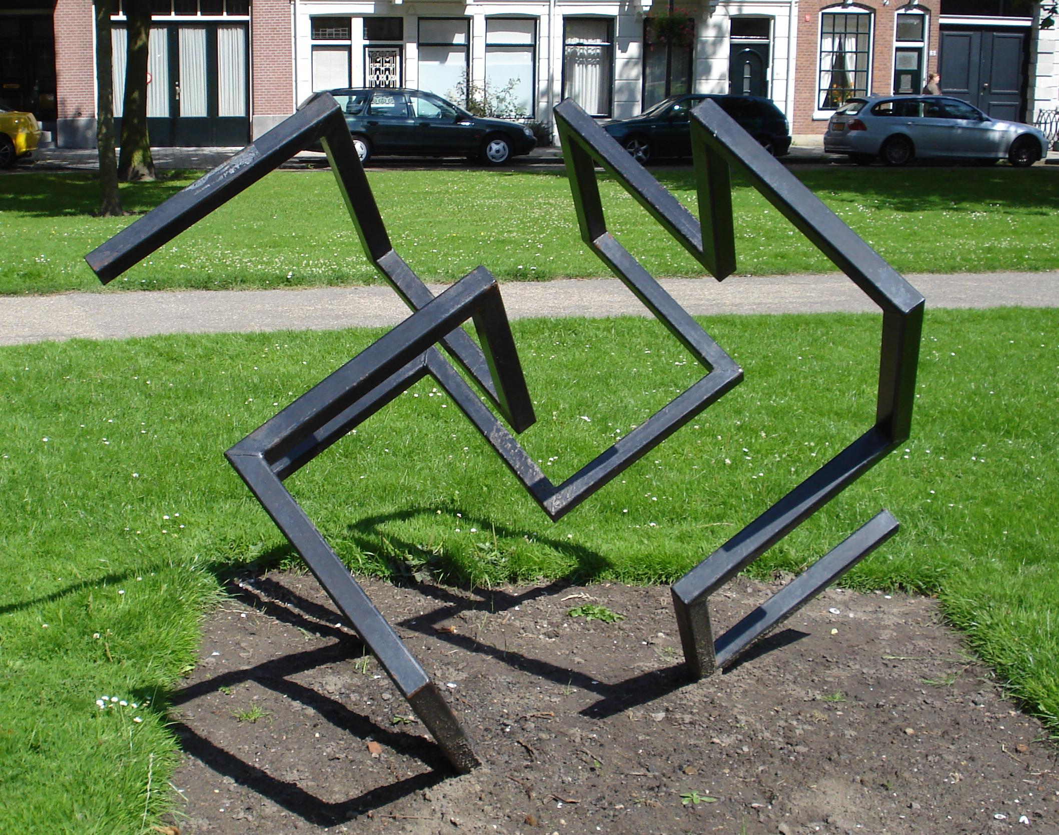 Schiedam, Plantage. Kunstwerk "Lines XXII" van Don Satijn. Schiedam/The Netherlands.